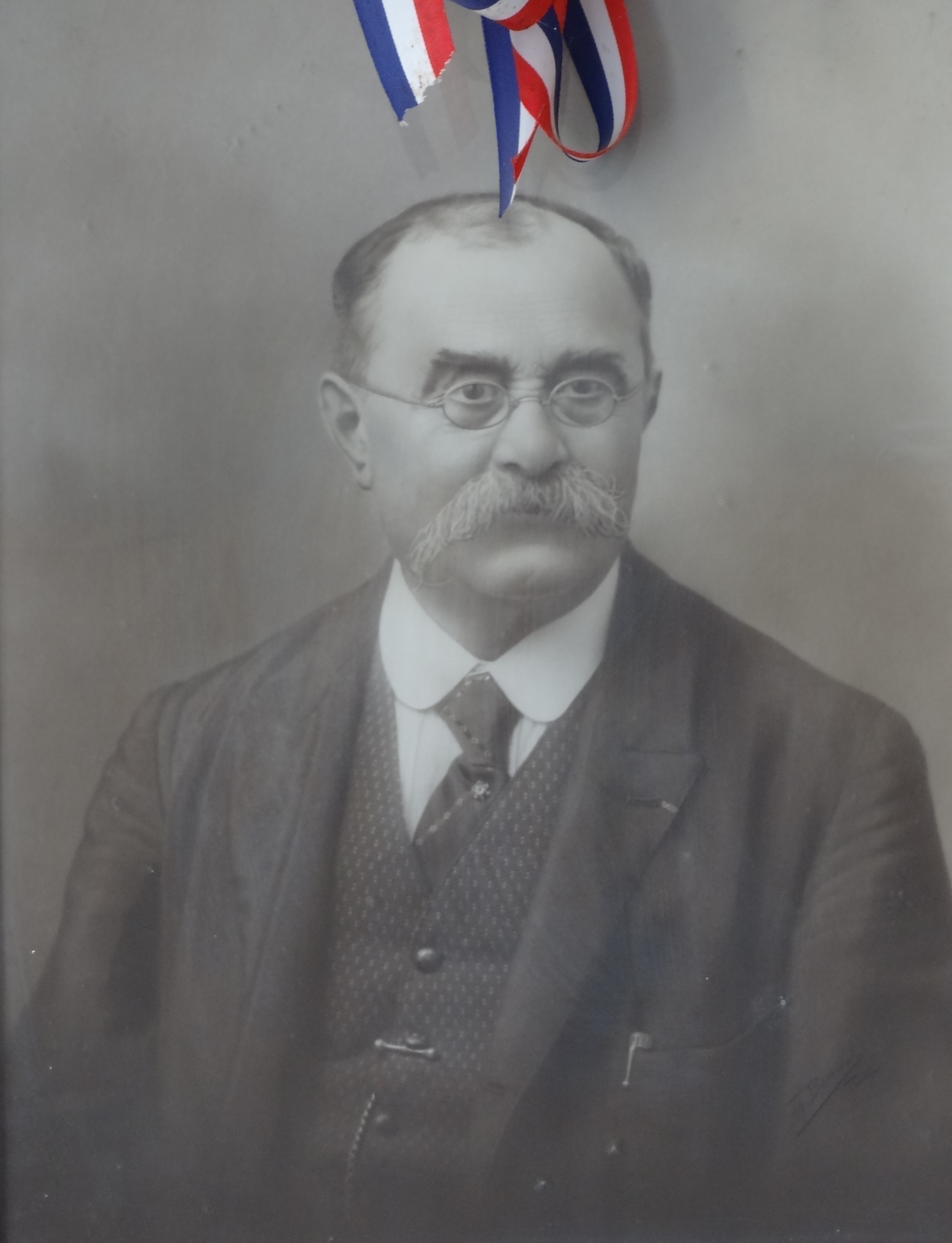 Jean-Baptiste François Pouloux (1863-1928), docteur en médecine à Saint-Setiers, Chevalier de la Légion d'Honneur.